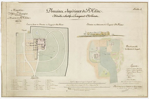 Plan de Longwood House, à Sainte-Hélène, par Eugène-François Masselin, capitaine du Génie.